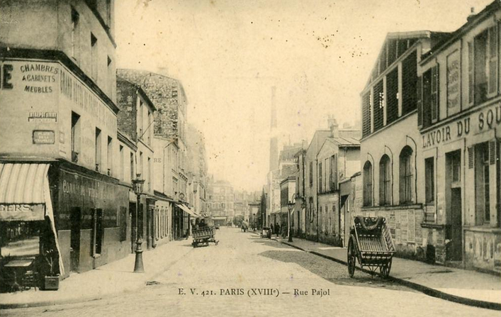 Rue Pajol. Paris XVIIIè arrondissement.